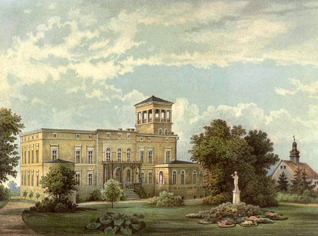 Schloss Wierzbiczany, Kreis Inowraclaw